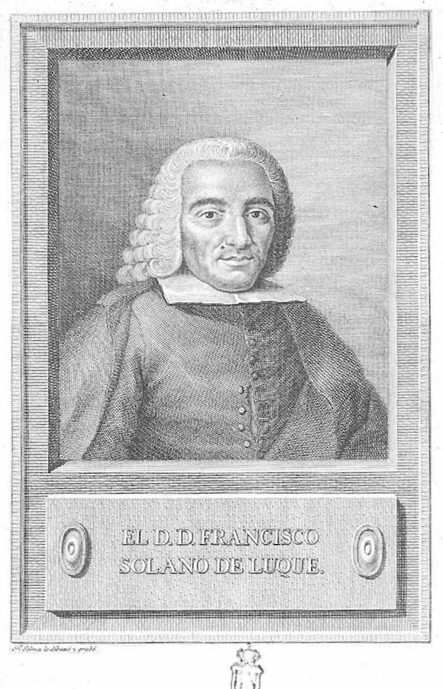 Francisco Solano de Luque, grabado de Fernando Selma por dibujo propio. Biblioteca Nacional de España. Ilustración de Observaciones sobre el pulso, 1787. Biblioteca Nacional de España